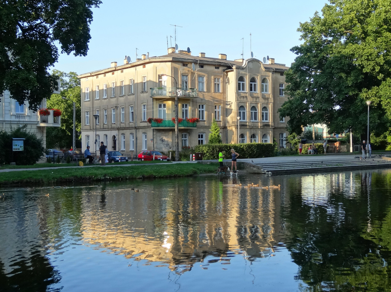 Kamienica ul. Kanałowa 15 (1897) nad Kanałem Bydgoskim